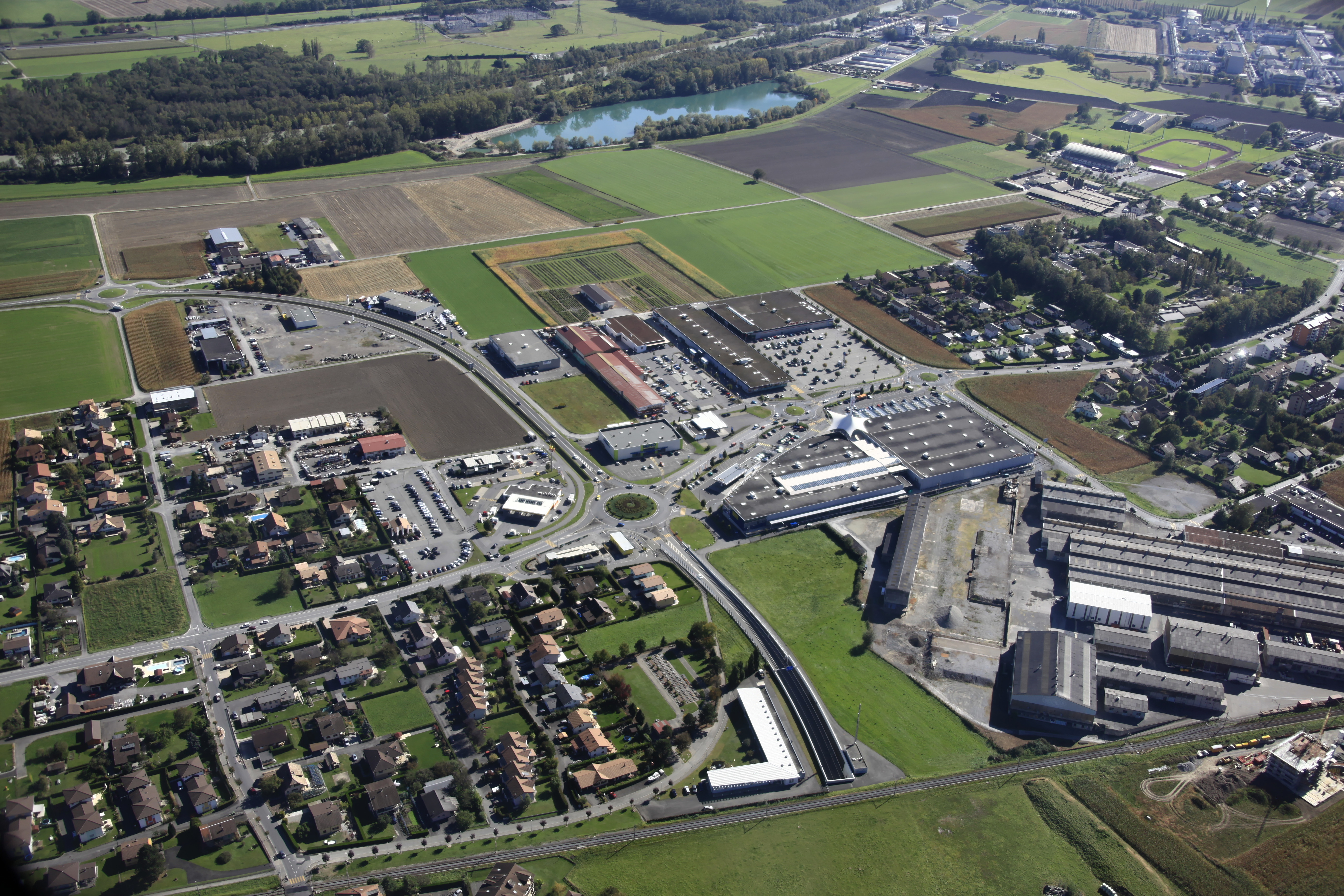 Photo aérienne de la zone commerciale de Collombey